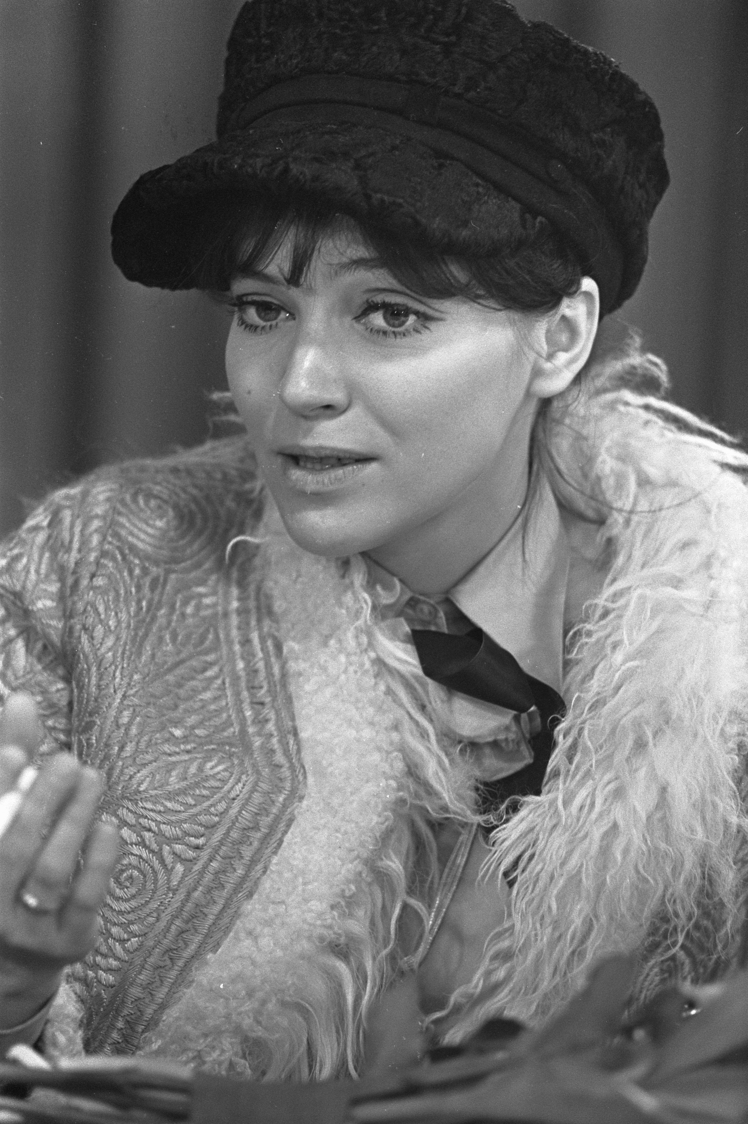 Collectie / Archief : Fotocollectie Anefo Reportage / Serie : [ onbekend ] Beschrijving : Aankomst Franse filmster Anna Karina op Schiphol Datum : 8 februari 1968 Locatie : Noord-Holland, Schiphol Trefwoorden : FILMSTERREN, aankomsten Persoonsnaam : Anna Karina Fotograaf : Evers, Joost / Anefo Auteursrechthebbende : Nationaal Archief Materiaalsoort : Negatief (zwart/wit) Nummer archiefinventaris : bekijk toegang 2.24.01.05 Bestanddeelnummer : 921-0595